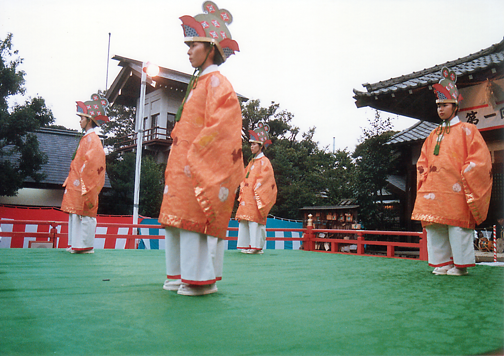 Ringa(gagaku dance)